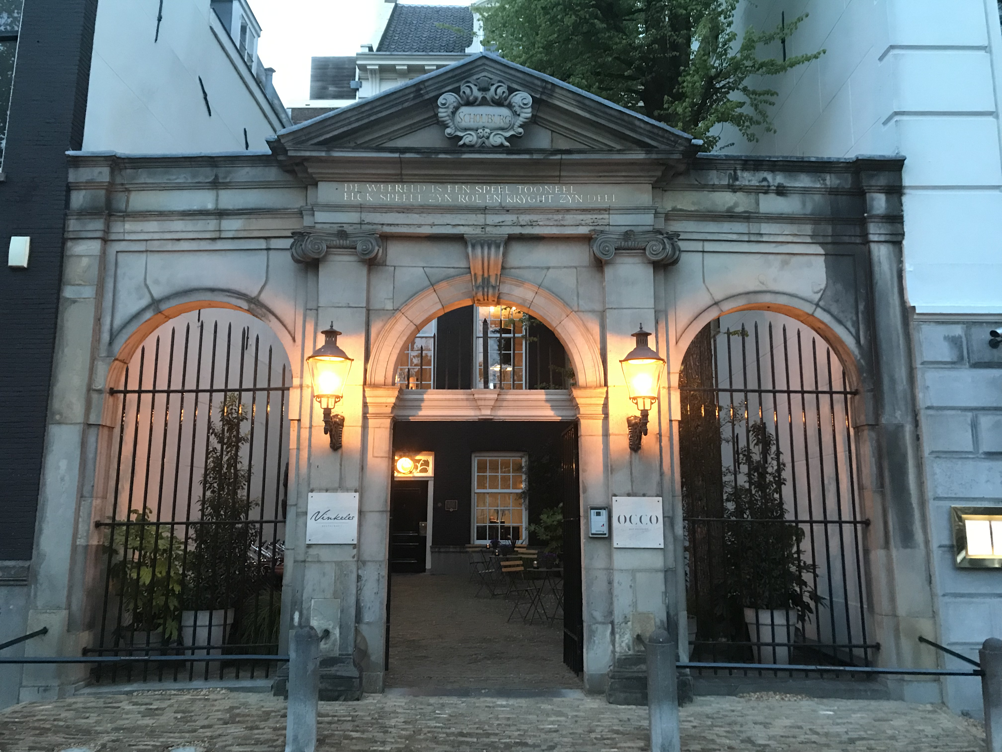 voormalige poort van de Amsterdamse Schouwburg op de Keizersgracht in Amsterdam